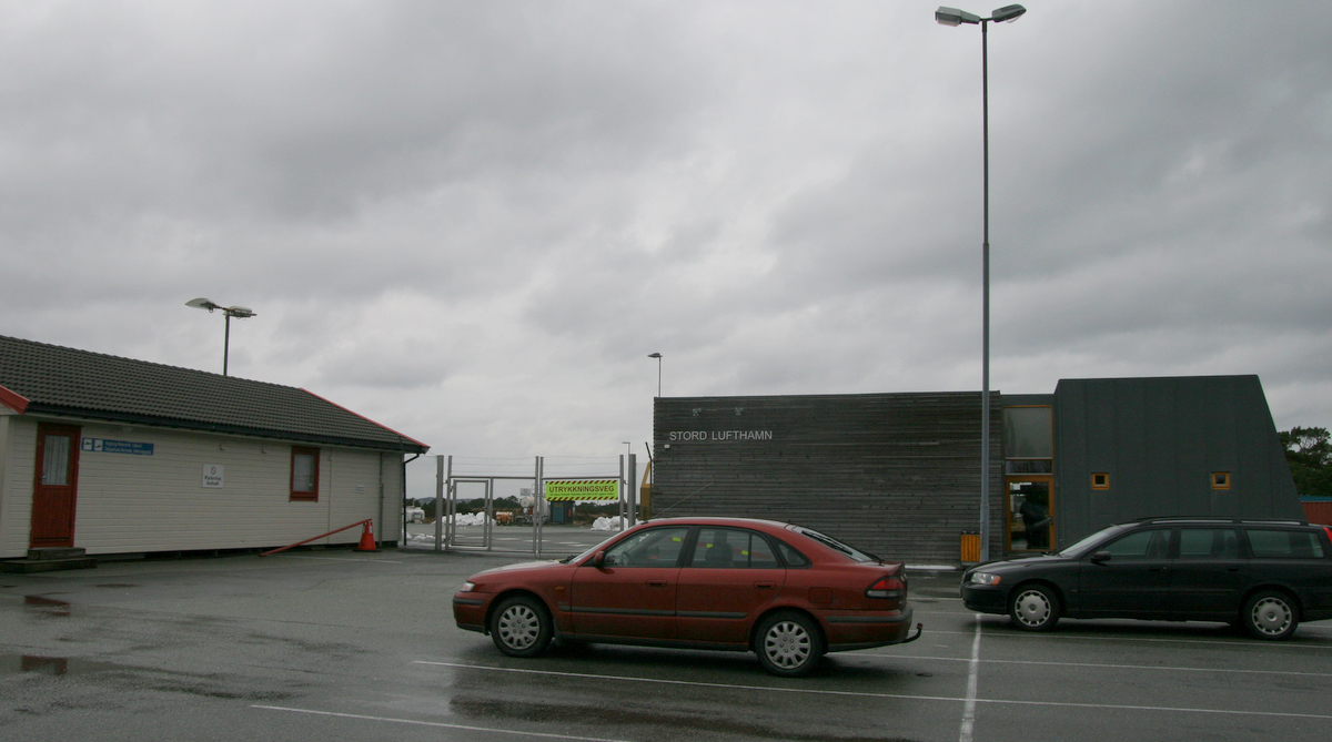 Stord Lufthavn